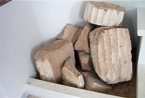 fragments de colonnes puniques, MN Carthage